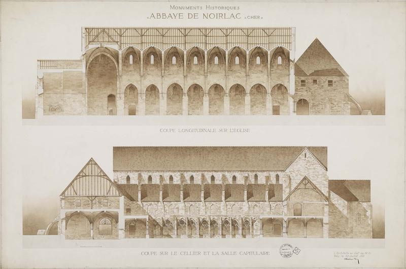 Lucien Roy, couple longitudinale de l'église, 20 juillet 1912